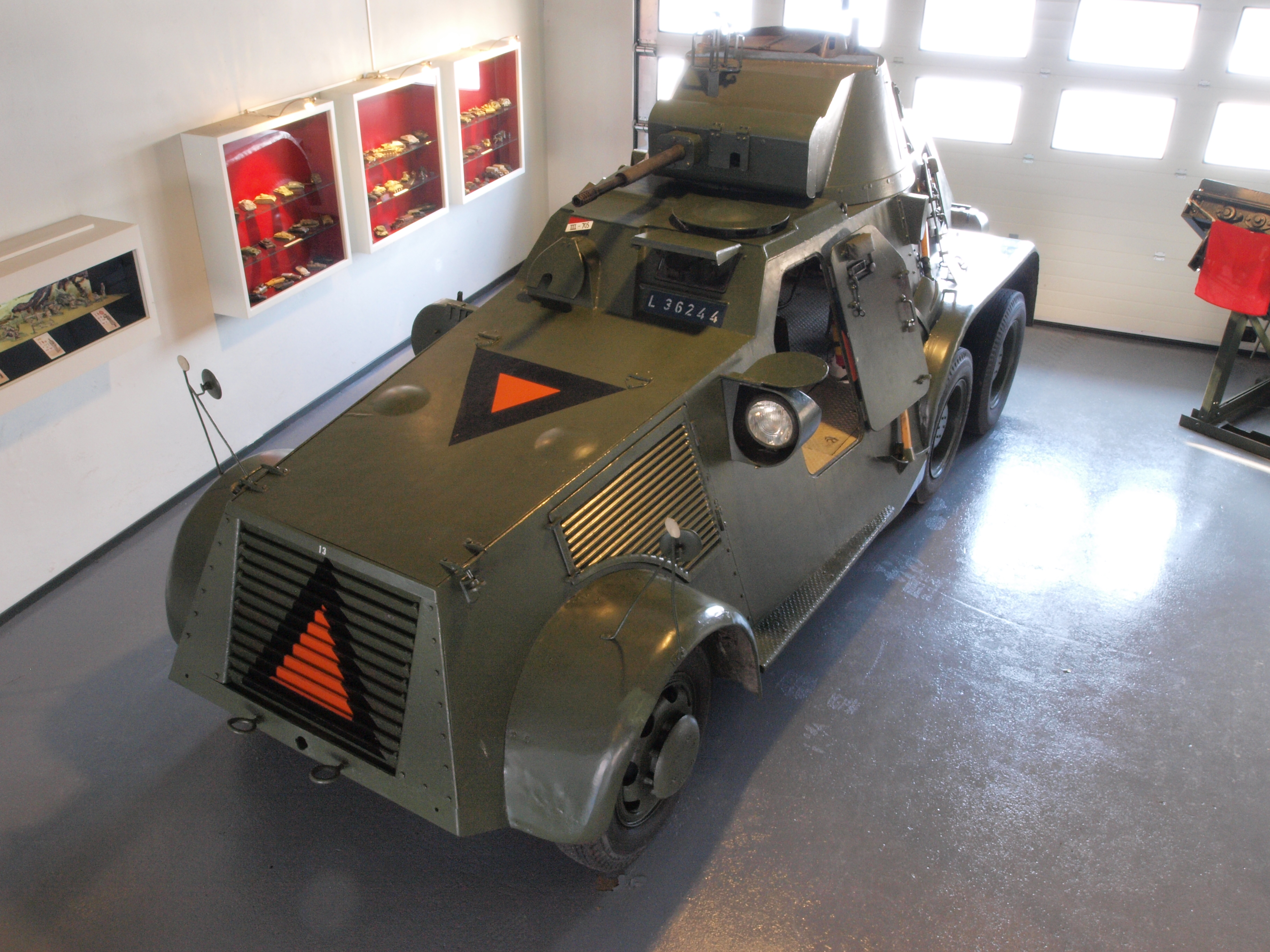 Landsverk M38 top view